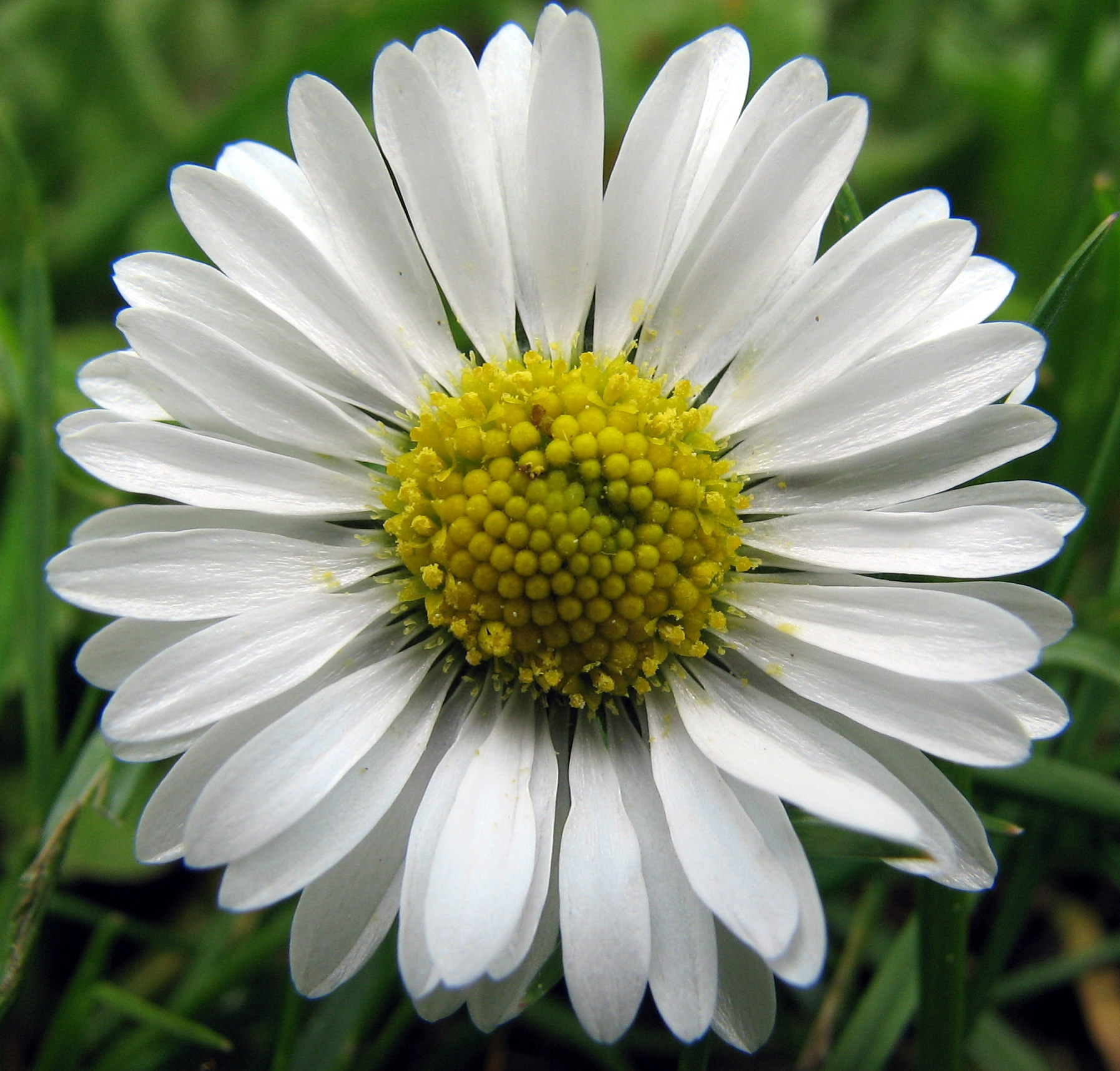 Bellis perennis, Daisy, Madeliefje